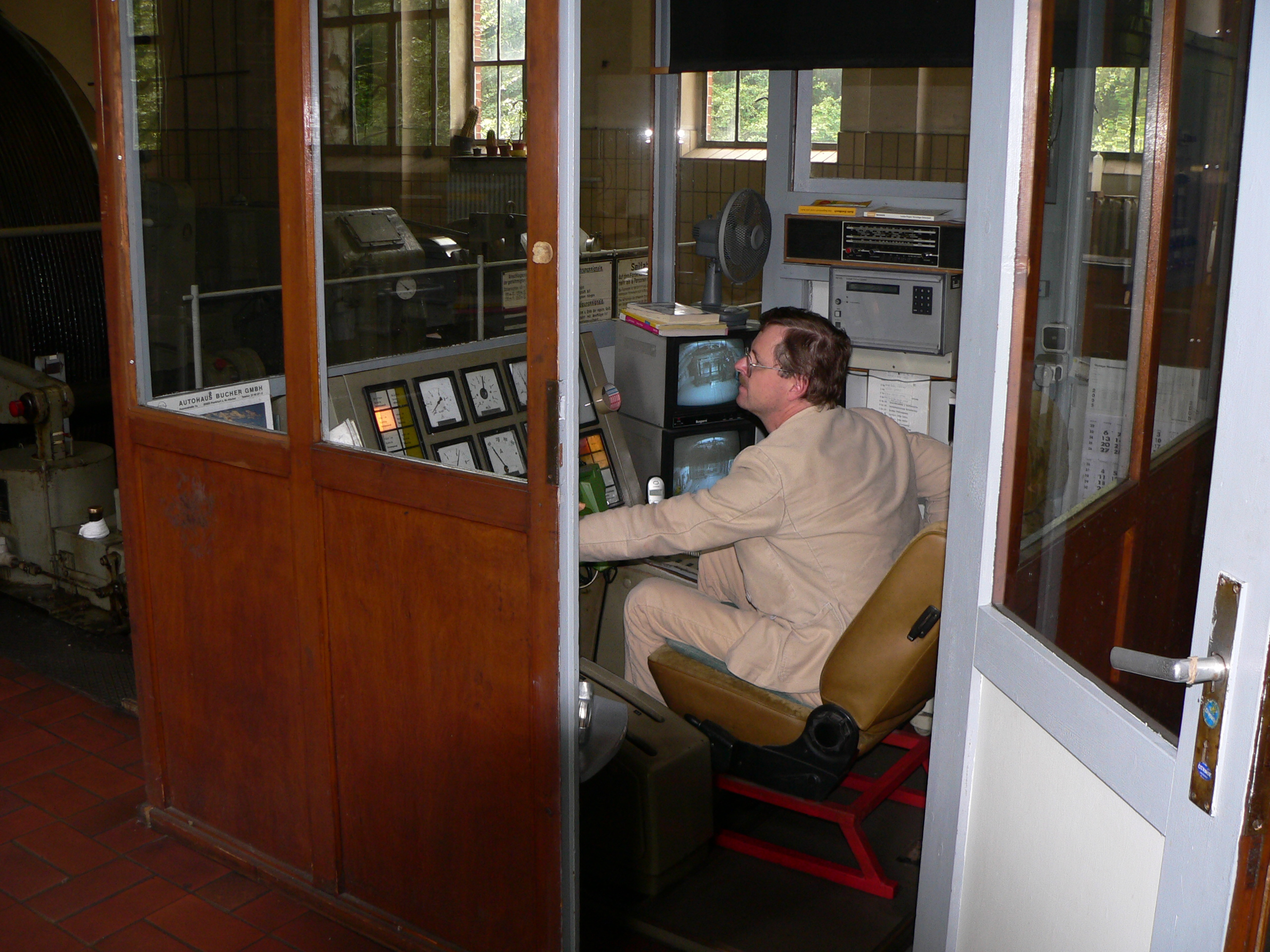 Fördermaschine, Steuerstand, Grube Fortuna bei Wetzlar, Deutschland